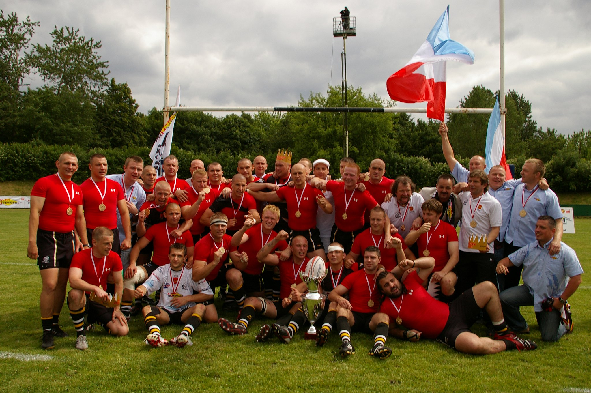 Finałowy mecz ekstraligi rugby sezonu 2009/2010 pomiędzy Budowlanymi Łódź a Lechią Gdańsk, rugbyści Budowlanych Łódź Personality rights warningAlthough this work is freely licensed or in the public domain, the person(s) shown may have rights that legally restrict certain re-uses unless those depicted consent to such uses. In these cases, a model release or other evidence of consent could protect you from infringement claims.